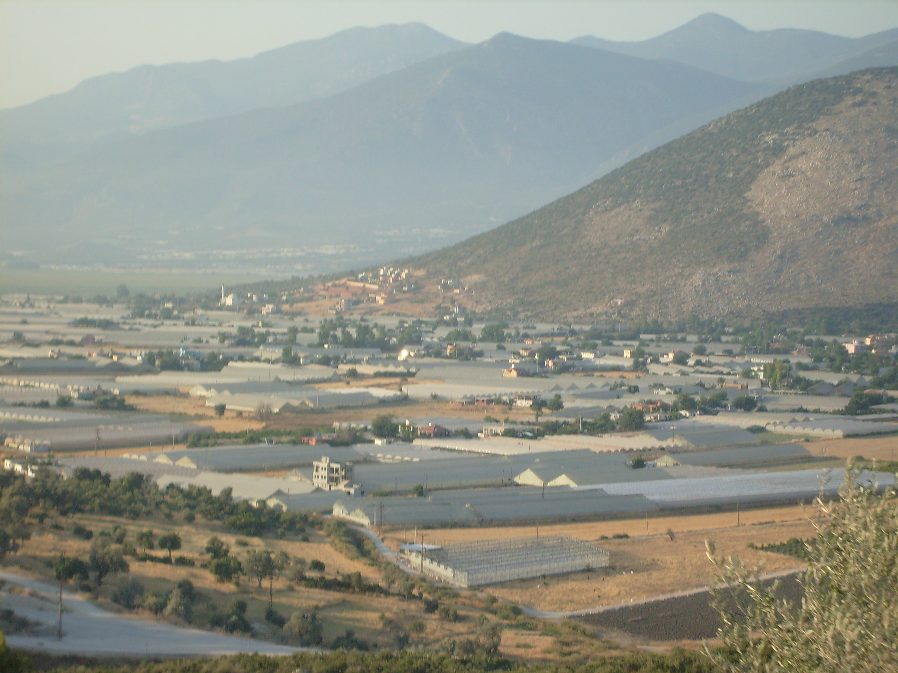 yeşilköy